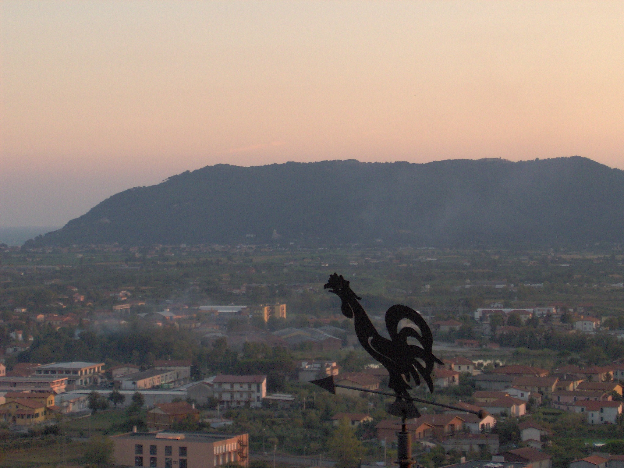 foto provincia spezia